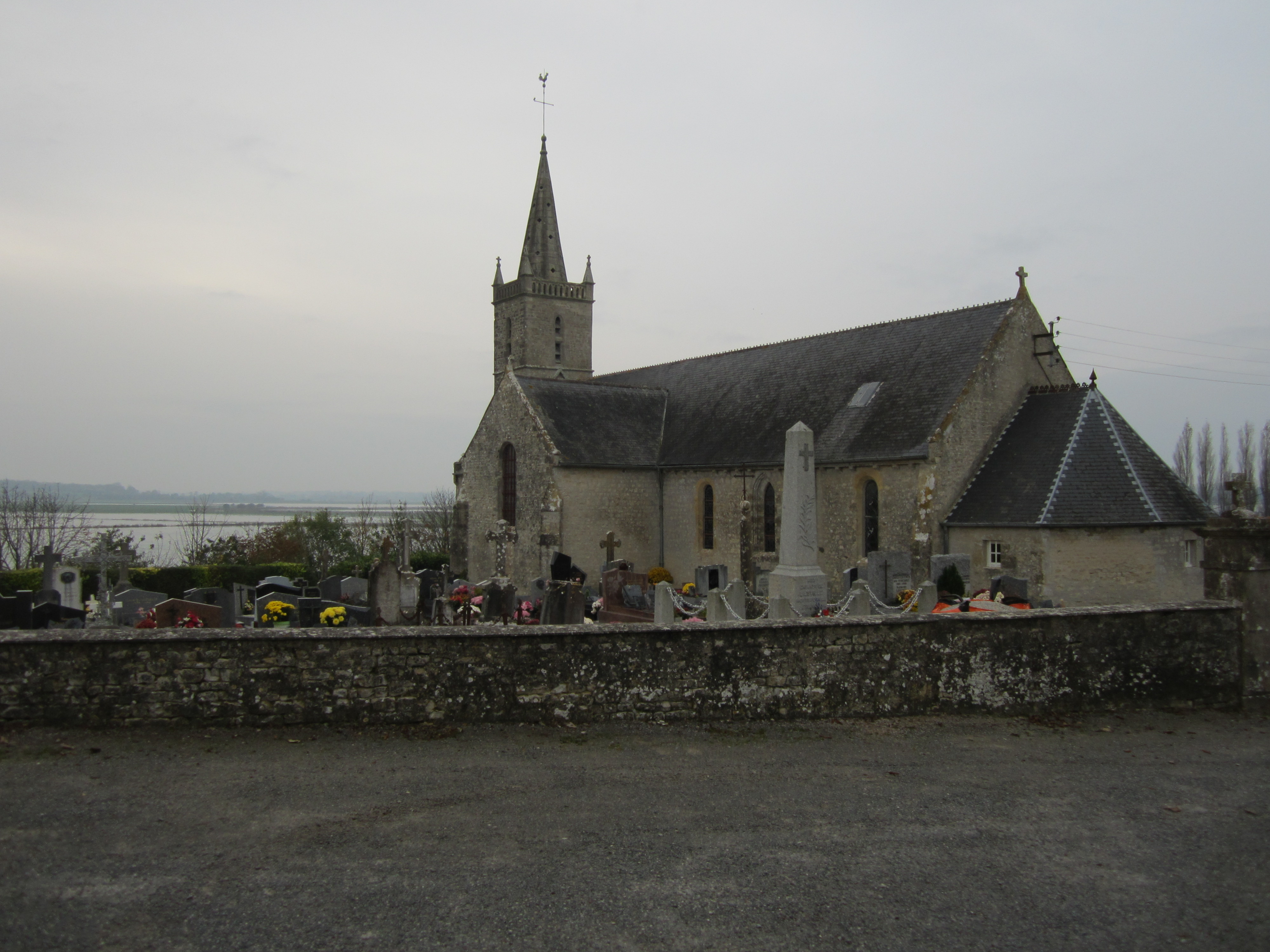 Liesville-sur-Douve, Manche